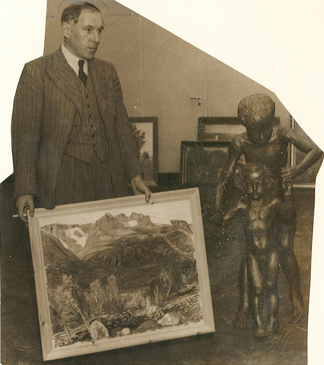 Axel Revold med maleri, ca. 1935. Ukjent fotograf. Fra Byhistorisk samling hos Oslo Museum.